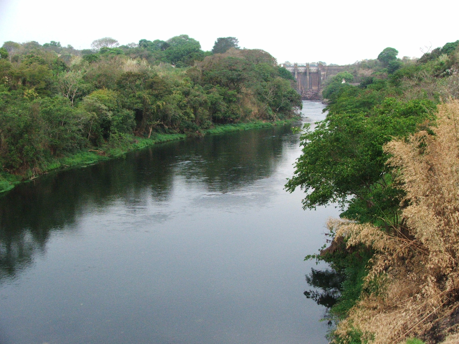 Rio Atibaia, após barragem